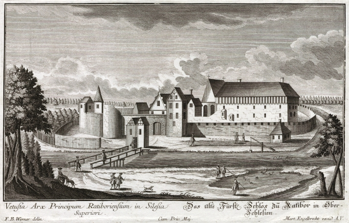 Zamek Piastowski w Raciborzu na przełomie XVII i XVIII wieku